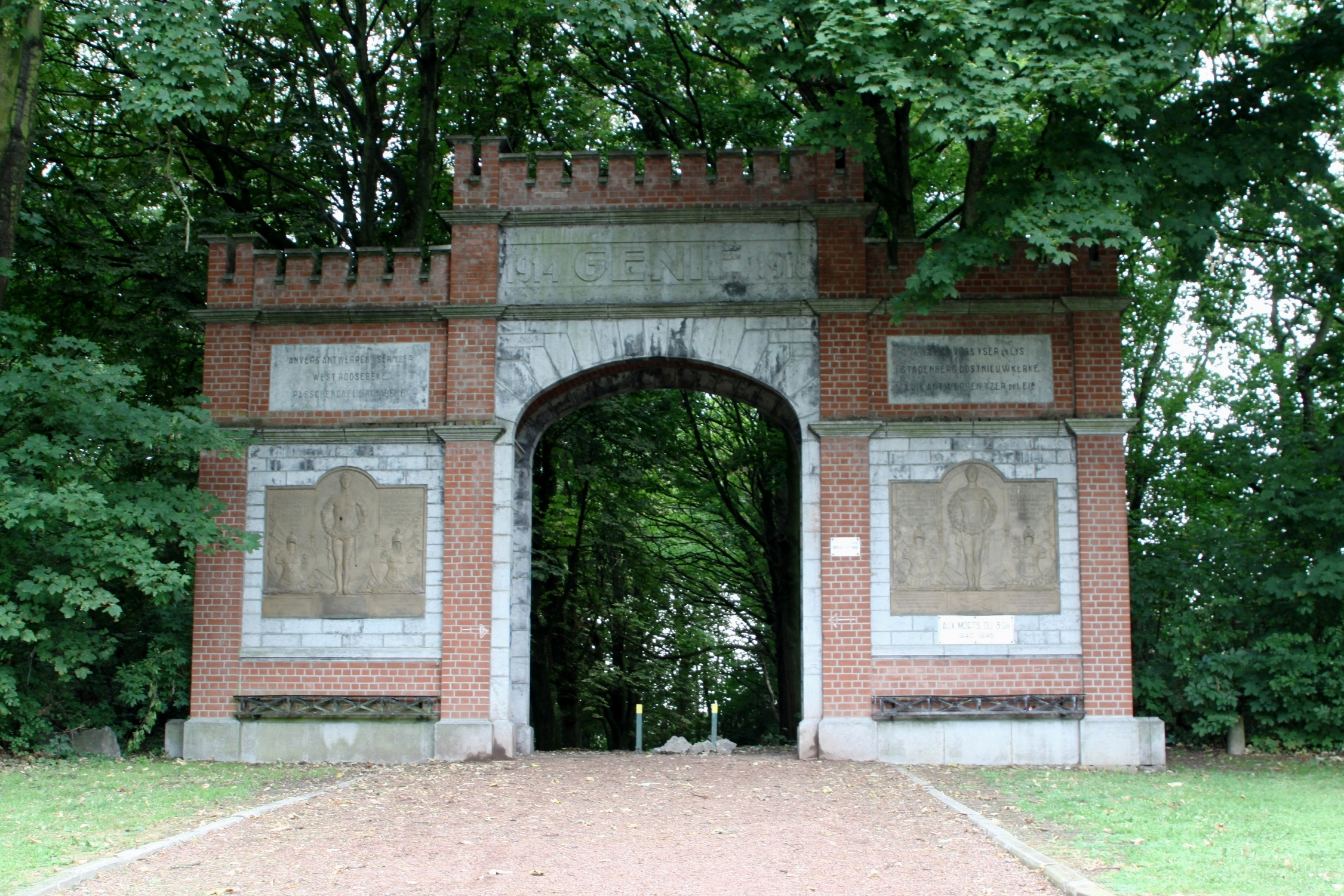 Porte d'honneur du 3ème Génie à l'ancien Fort de la Chartreuse à Liège